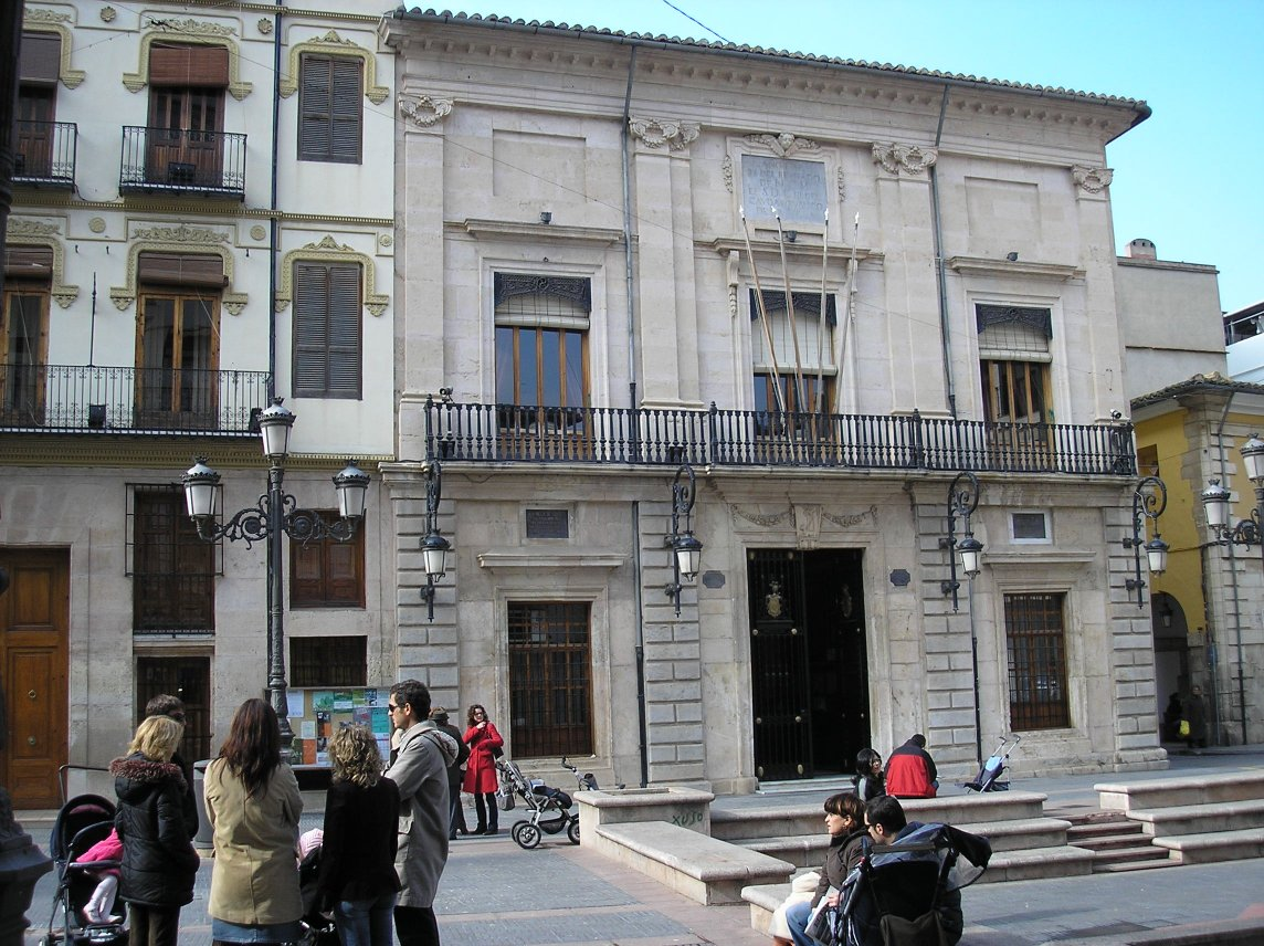 Sueca és un municipi valencià a la comarca de la Ribera Baixa. Façana de l'Ajuntament de Sueca.